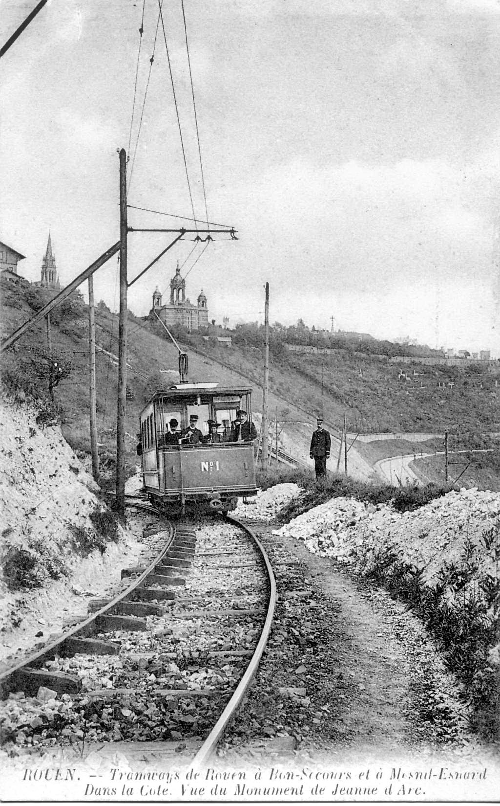 Carte postale ancienne Tramway de Rouen à Bon-Secours et à Mont-Esnard - Dans la côte - Vue du Monument de Jeanne d'Arc